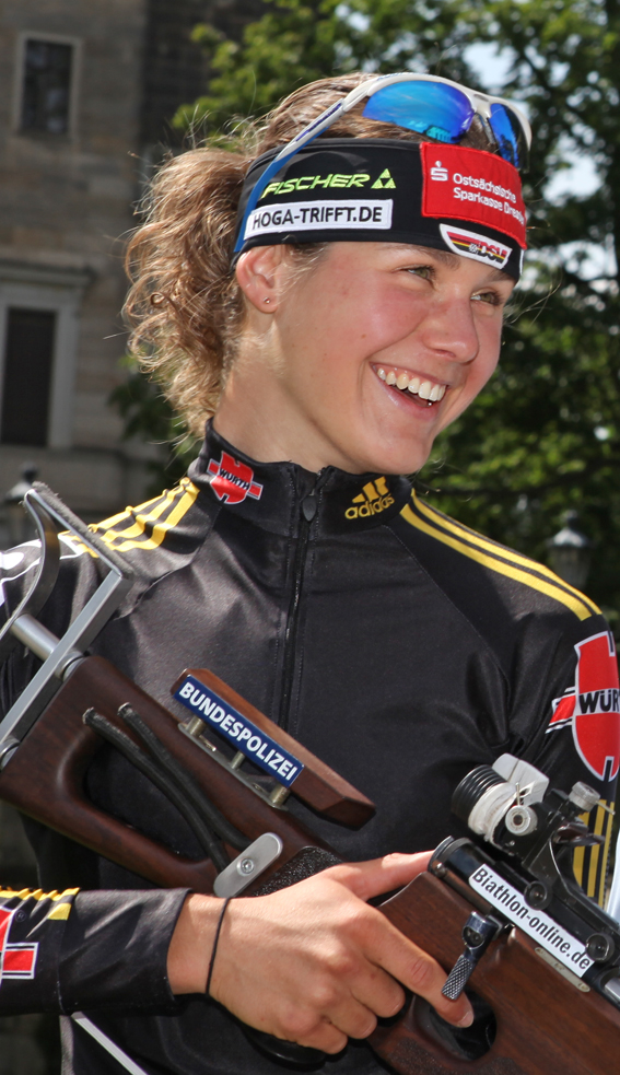 Tina Bachmann (deutsche Biathletin, Portrait